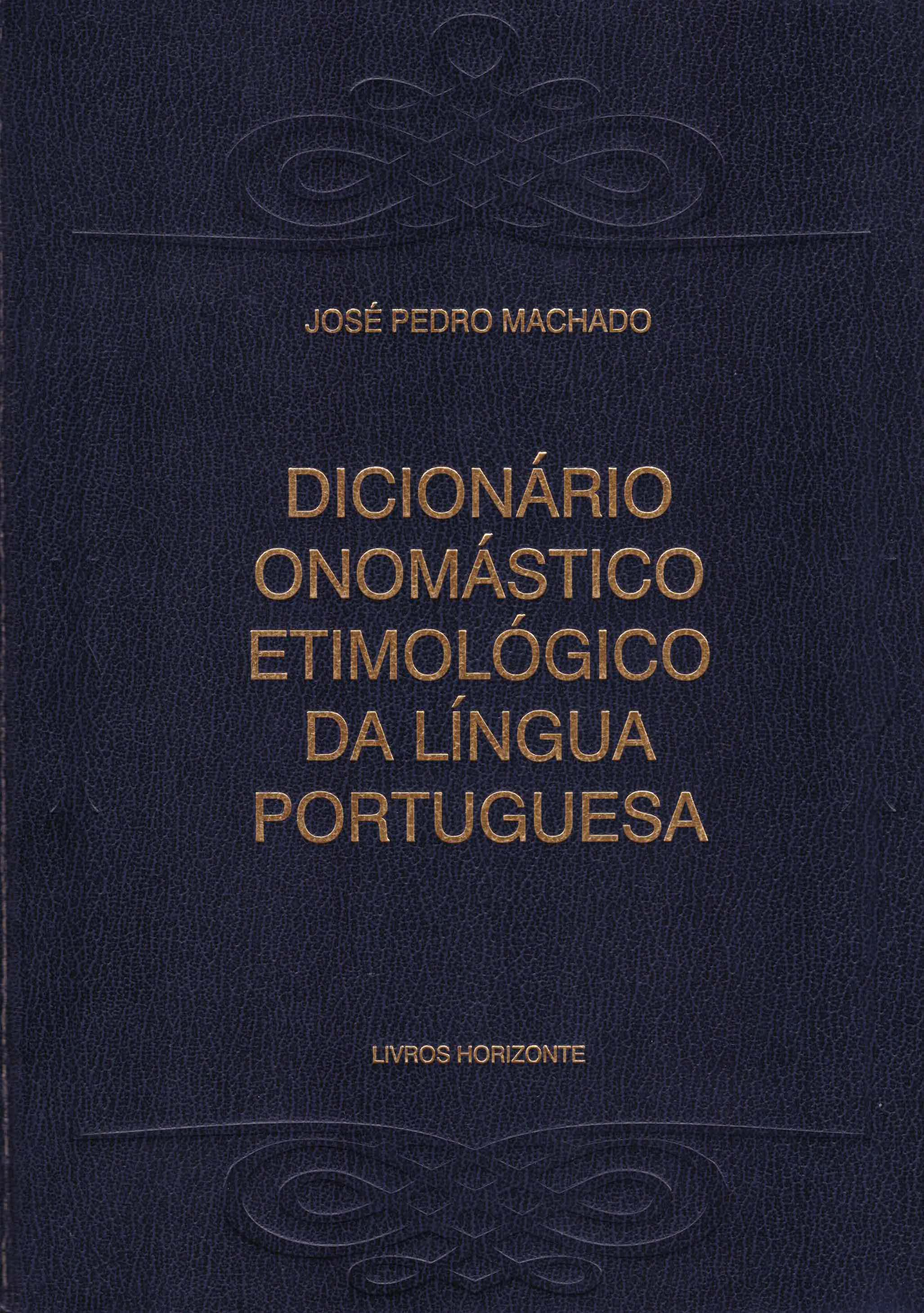 Capa do Tomo I do Dicionário Onomástico Etimológico da Língua Portuguesa de José Pedro Machado.